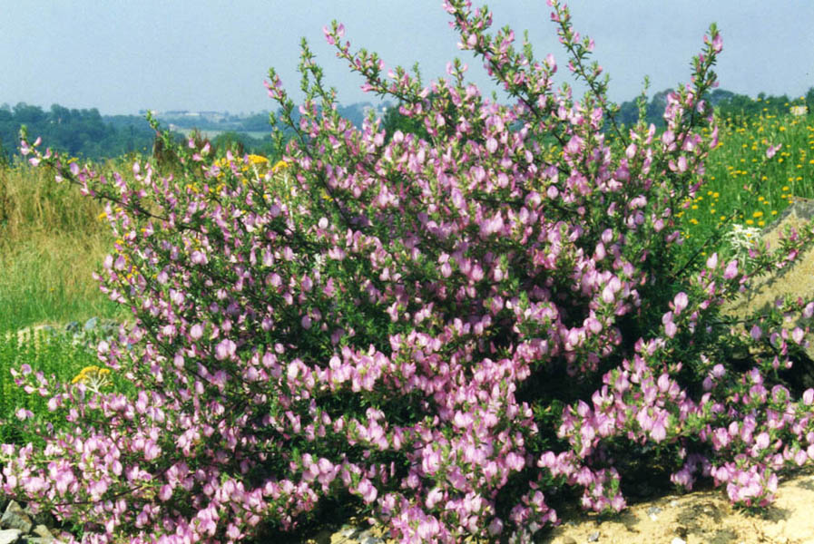 Ononis spinosa